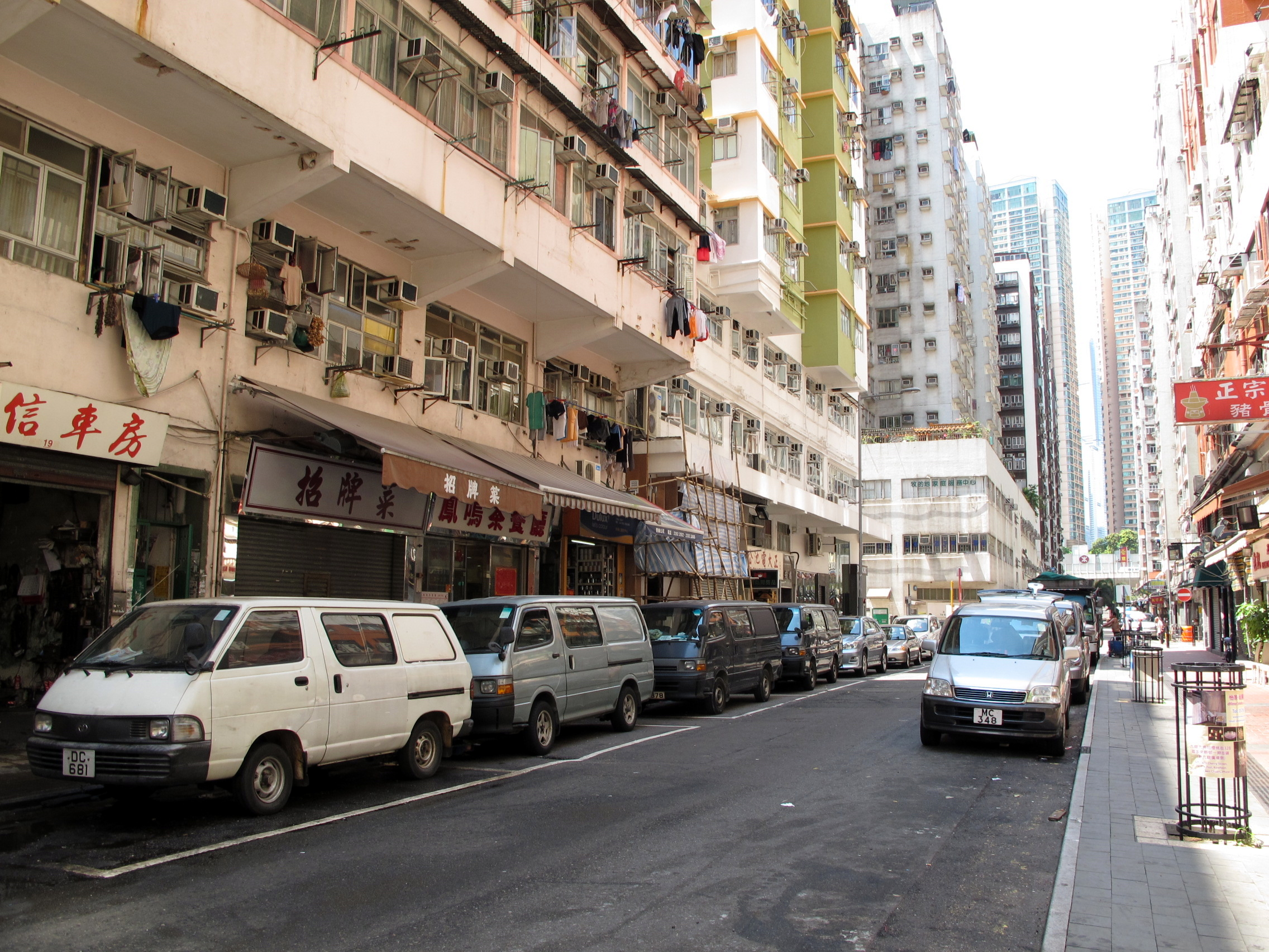 Pine Street